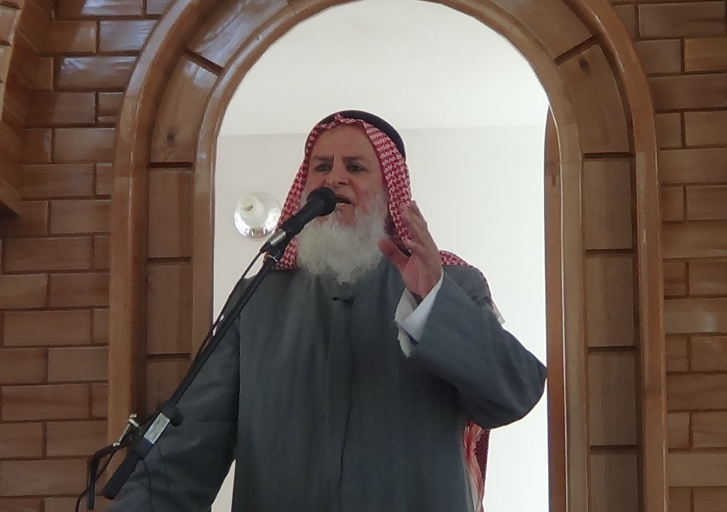 الشيخ العلامة ناصر السنة محمد بن سلمان أبو جامع